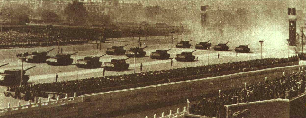 1952年中华人民共和国第三年国庆节庆祝典礼